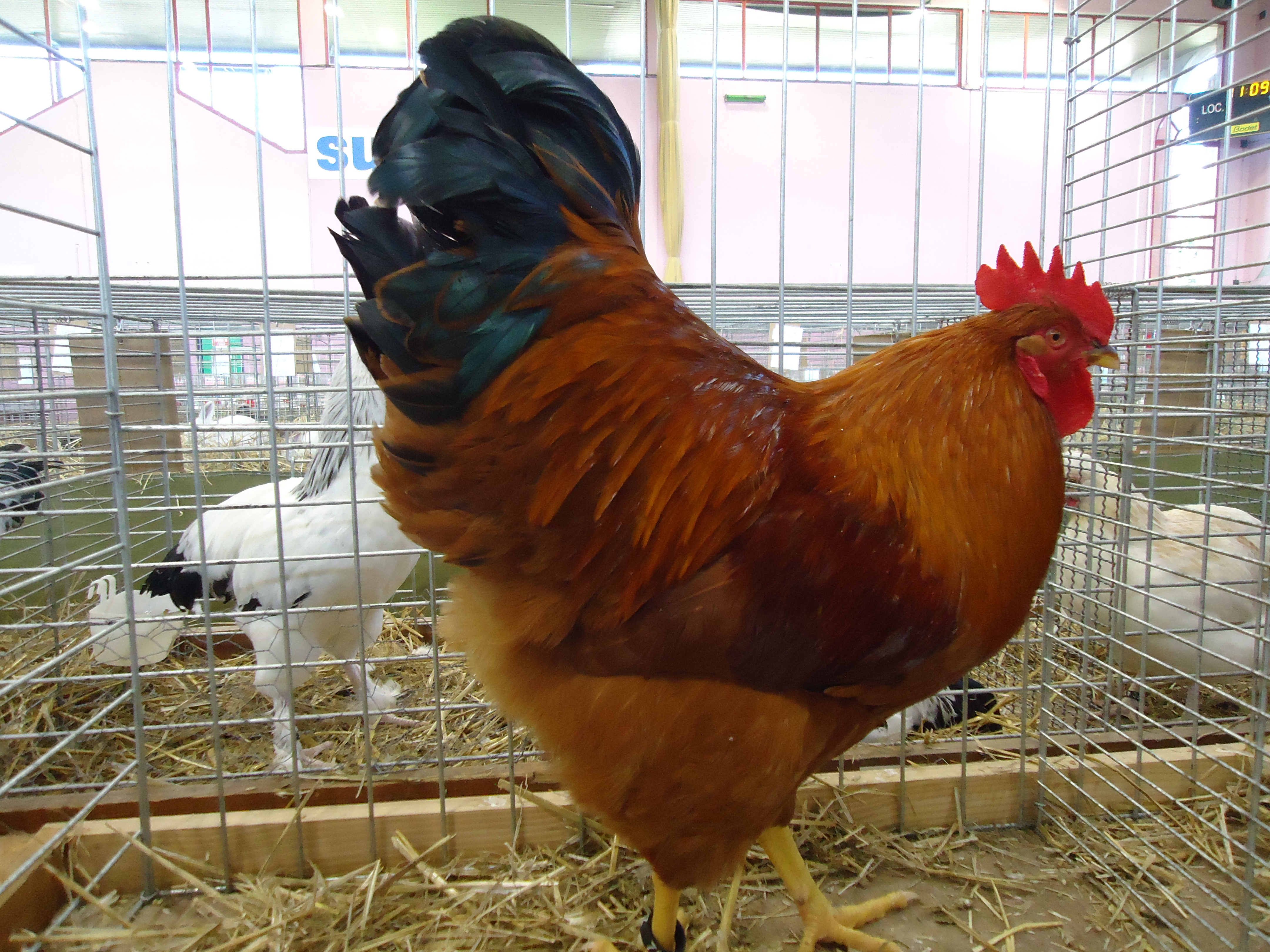 Coq new